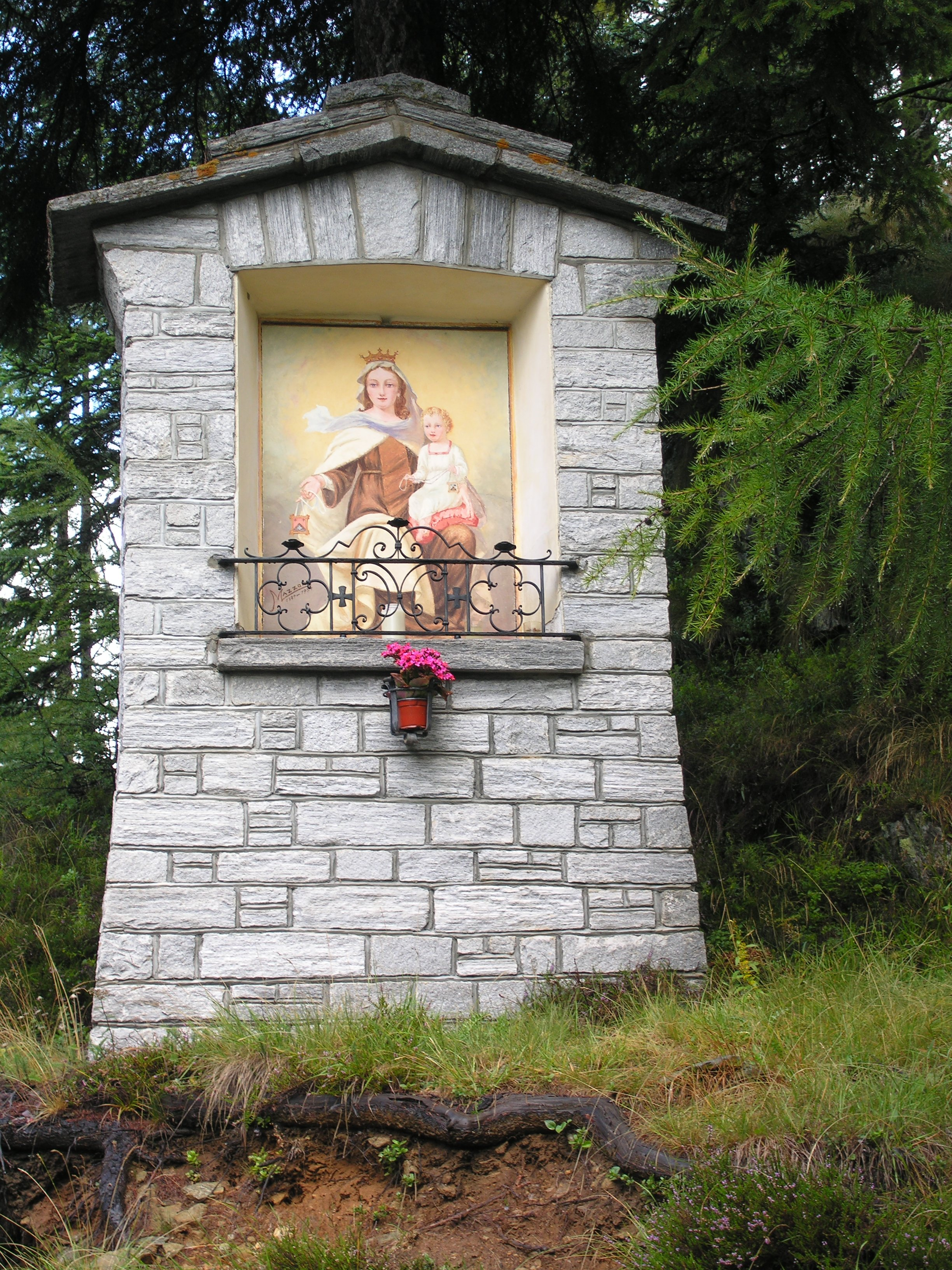 Koplytėlė Šveicarijos Itališkoje dalyje. Audriaus Meskausko nuotrauka.